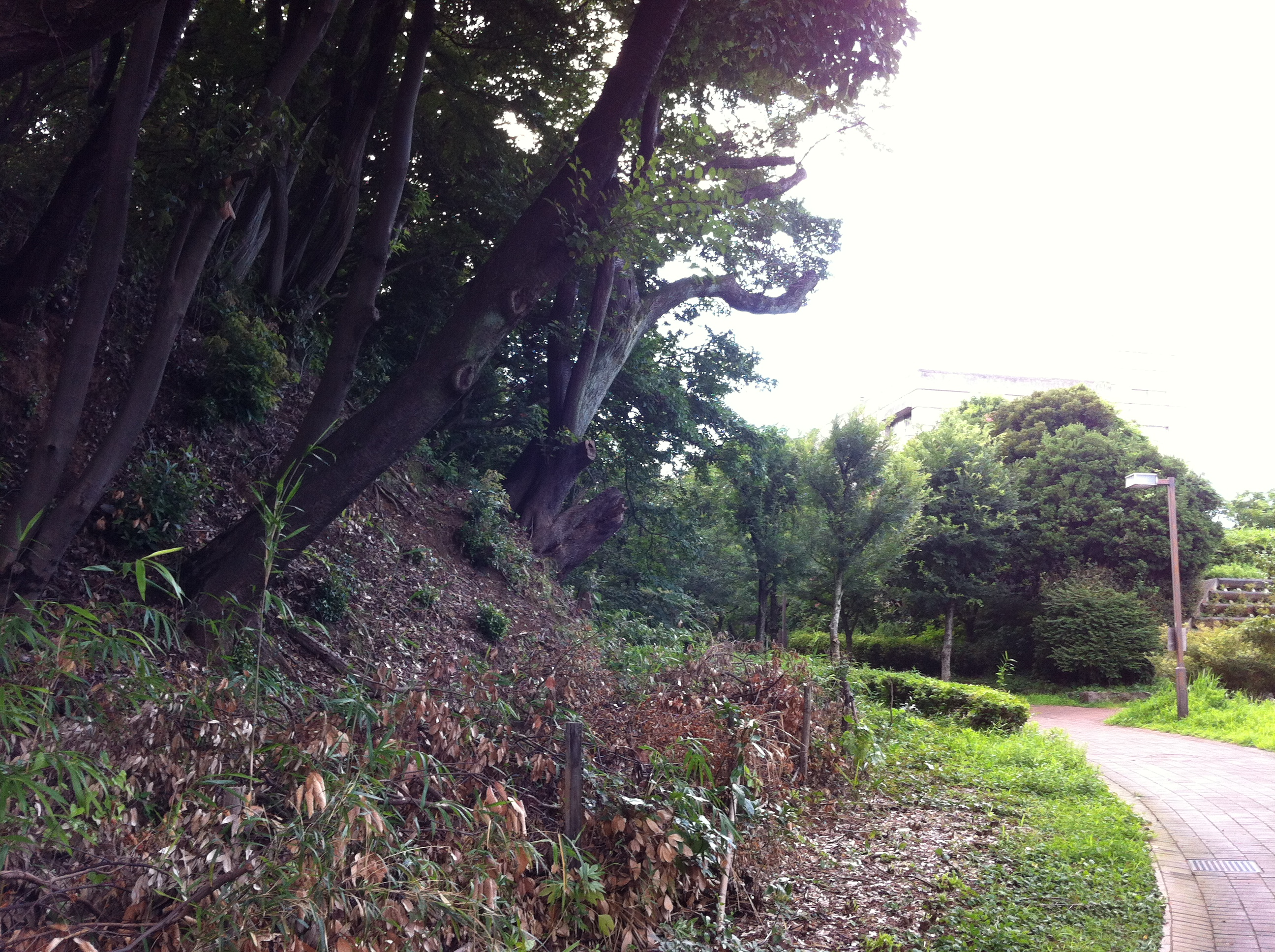 1 Chome Edahigashi, Tsuzuki-ku, Yokohama-shi, Kanagawa-ken 224-0006, Japan